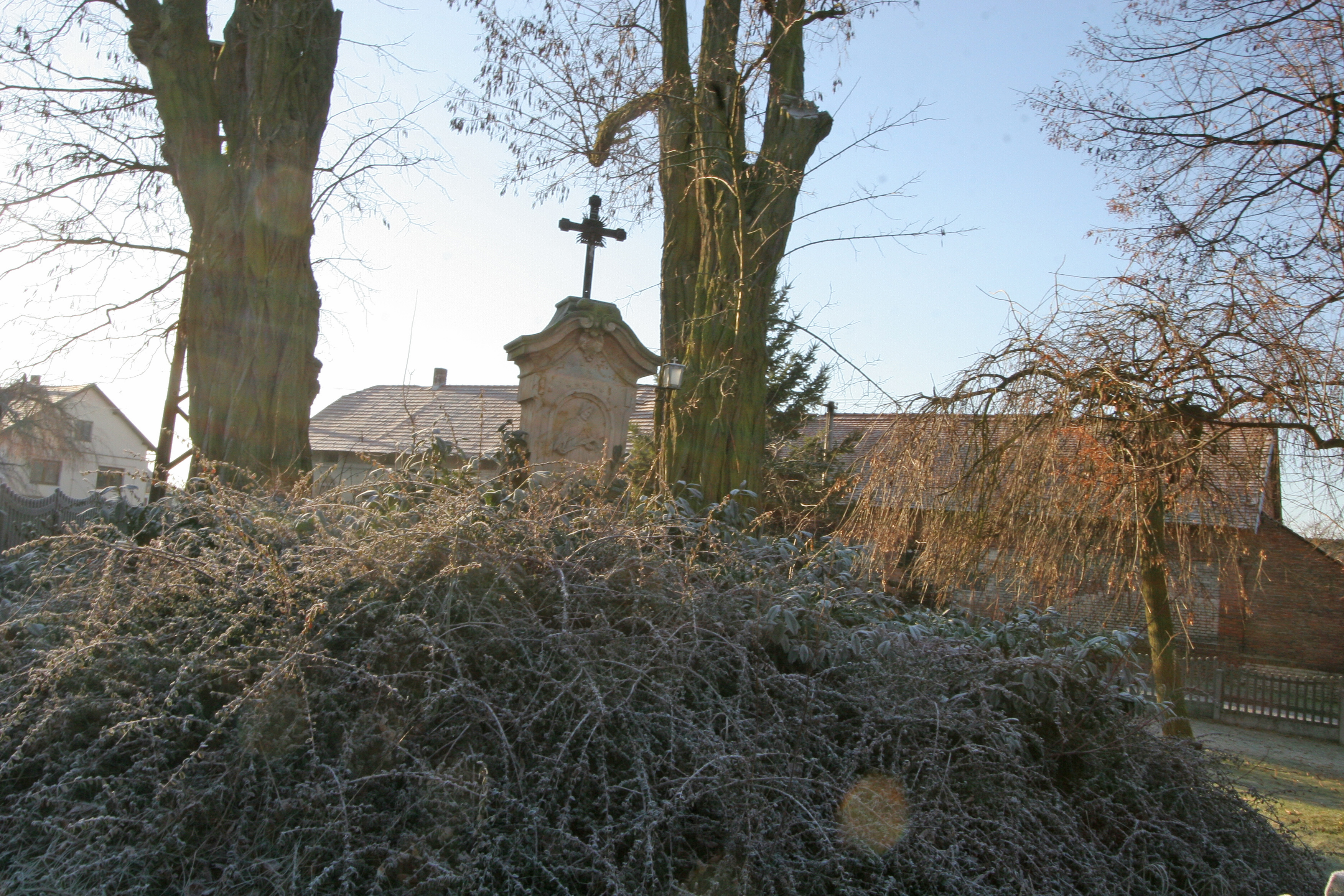 Křičeň křížek